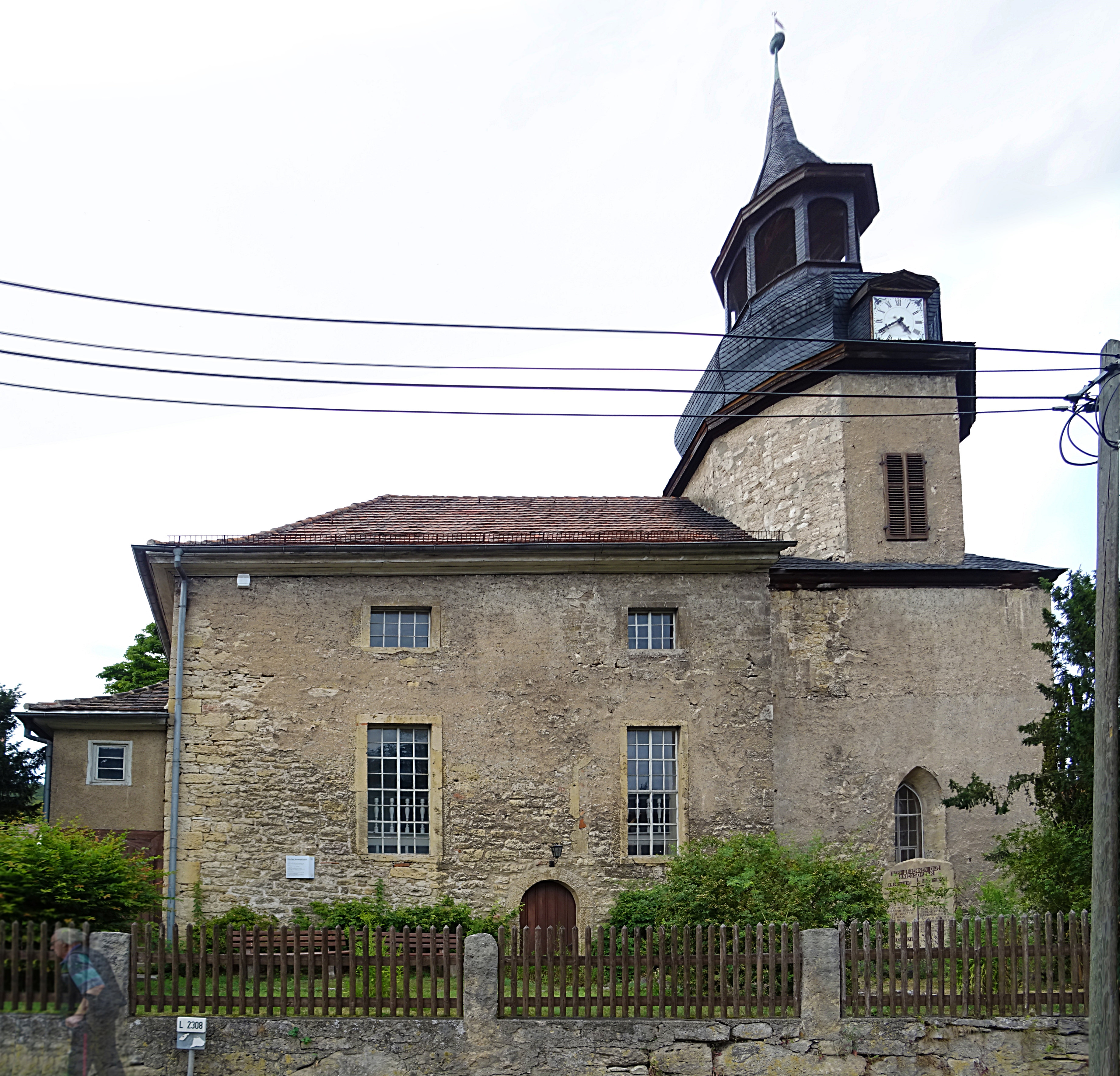 Dorfkirche Ammerbach von Süden